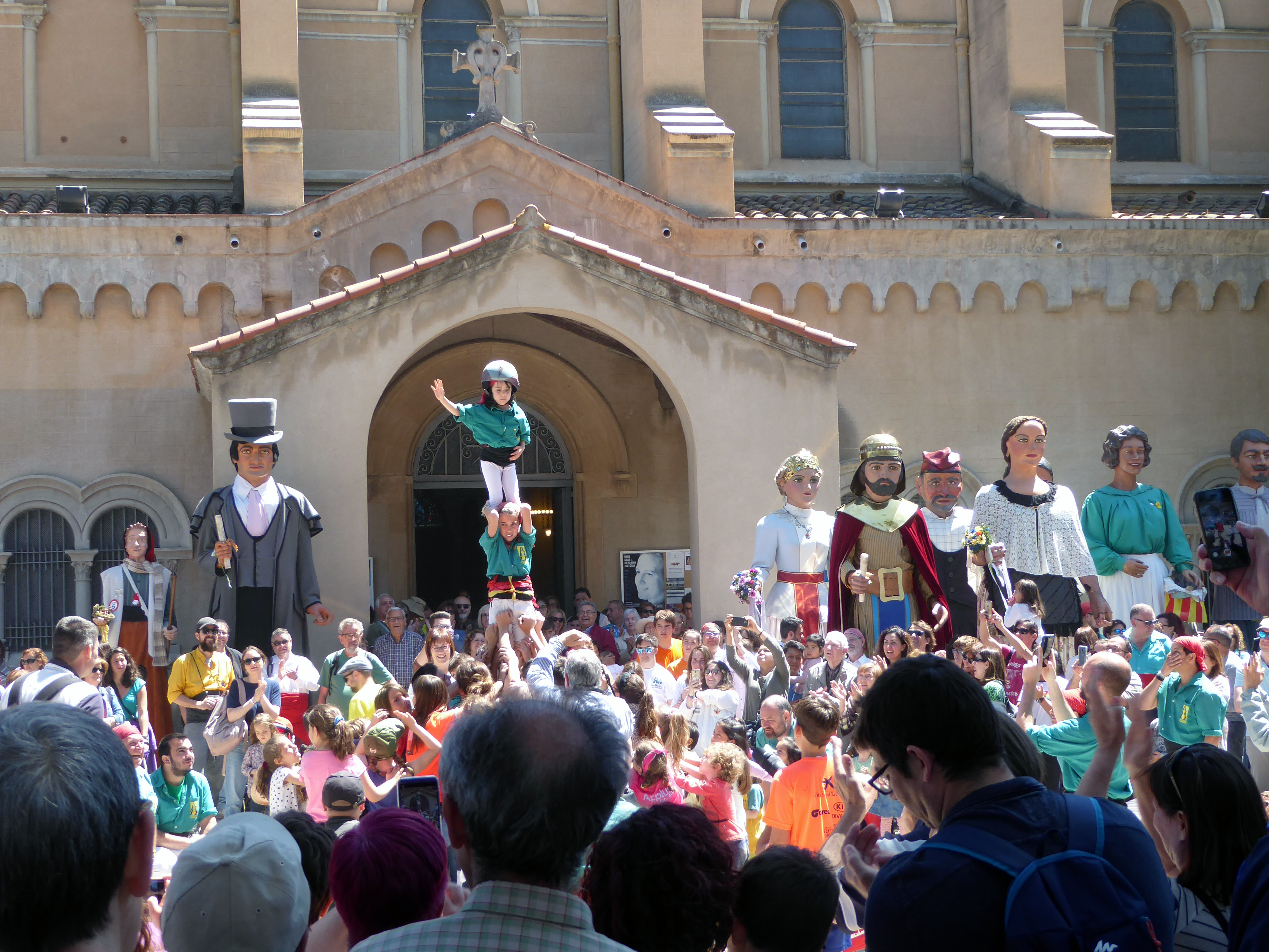 Gegants i Castellers de Sabadell davant del Santuari de la Salut. Aplec de la Salut 2019